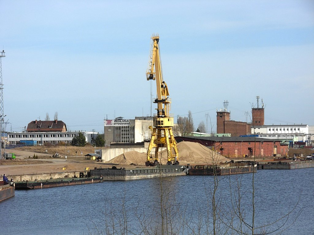 Port Żeglugi Bydgoskiej